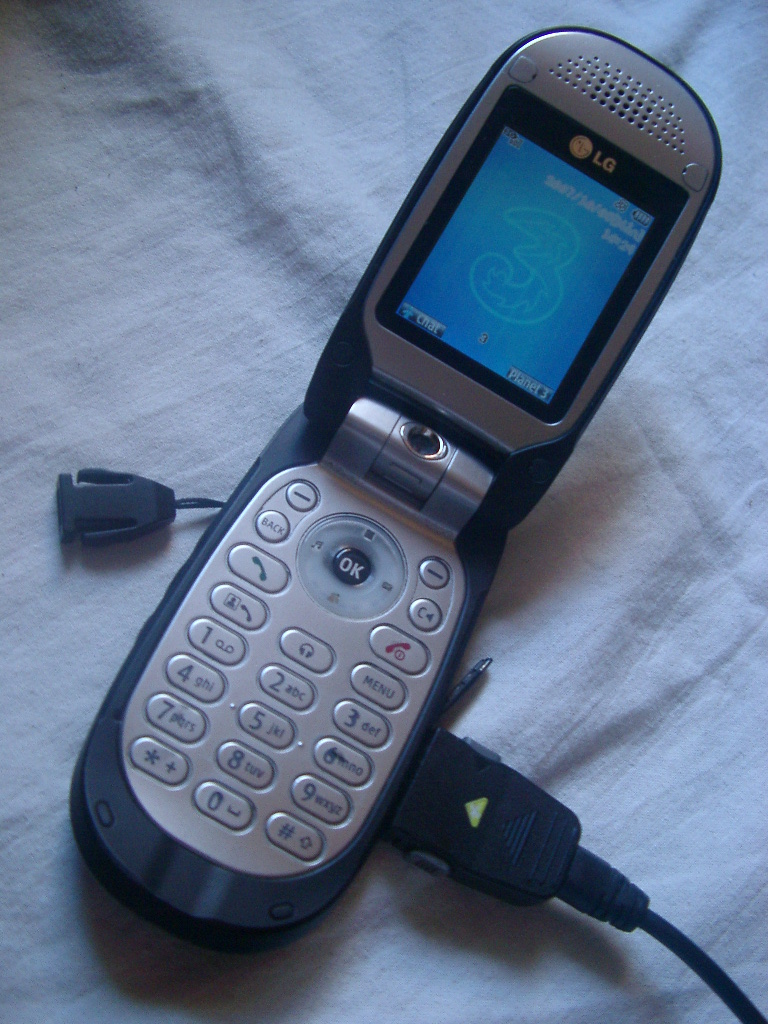 LG u300 open